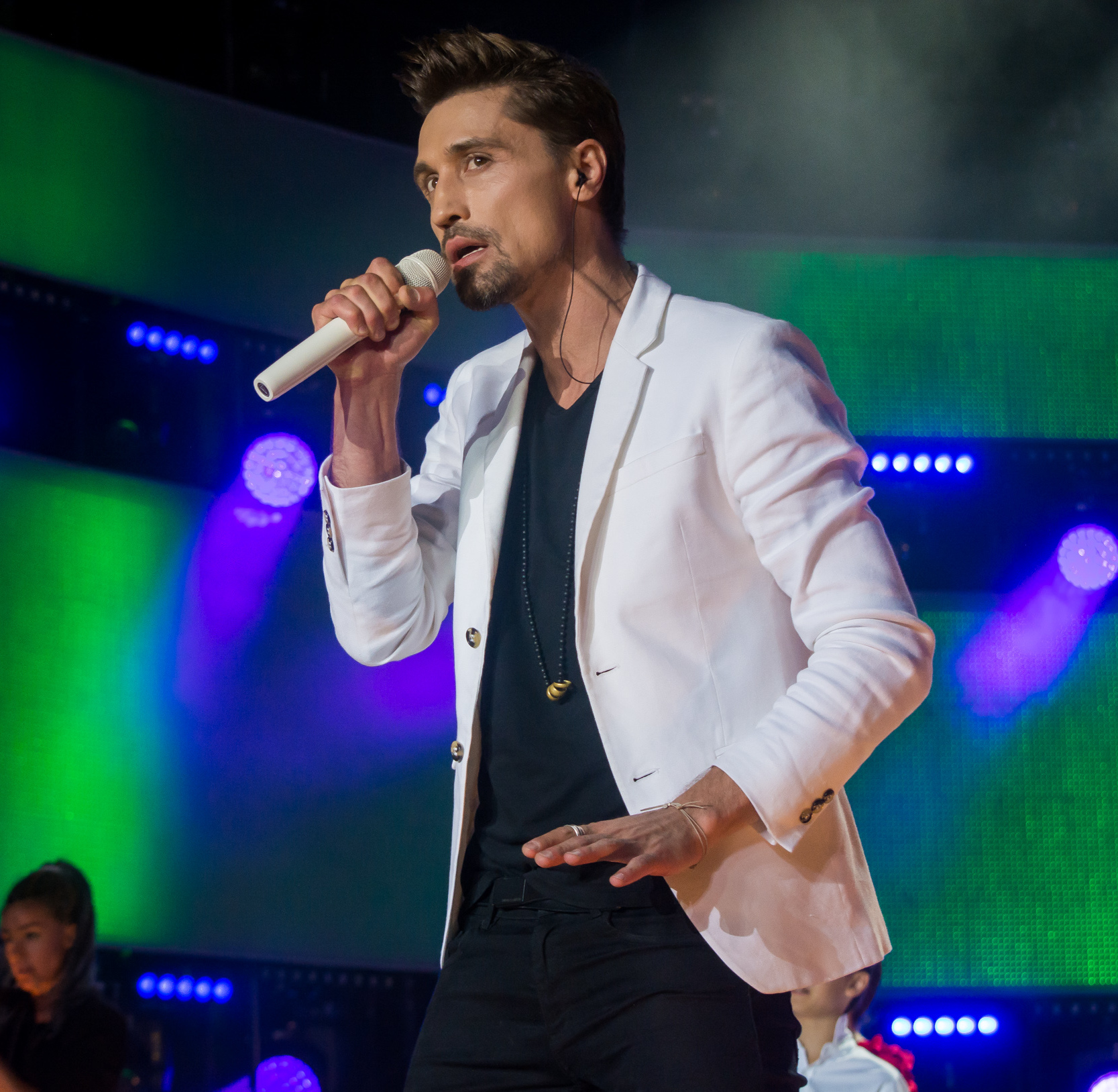 Дима Билан на Детской Новой волне 2016